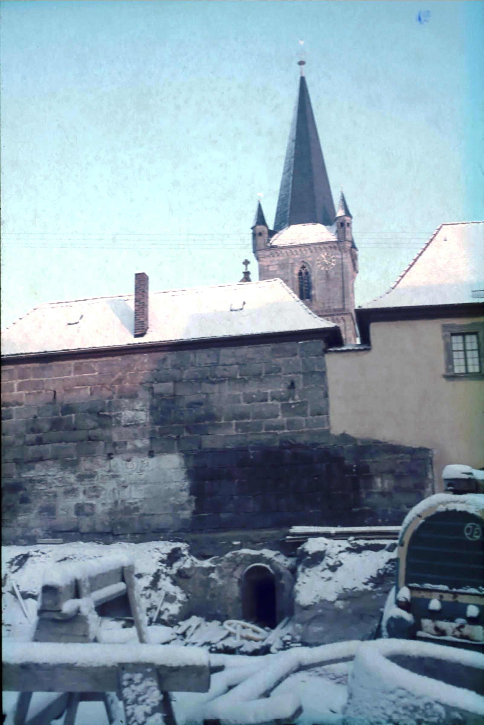 Unterirdische Gänge in Hannberg (Heßdorf), Landkreis Erlangen-Höchstadt, Foto 1960